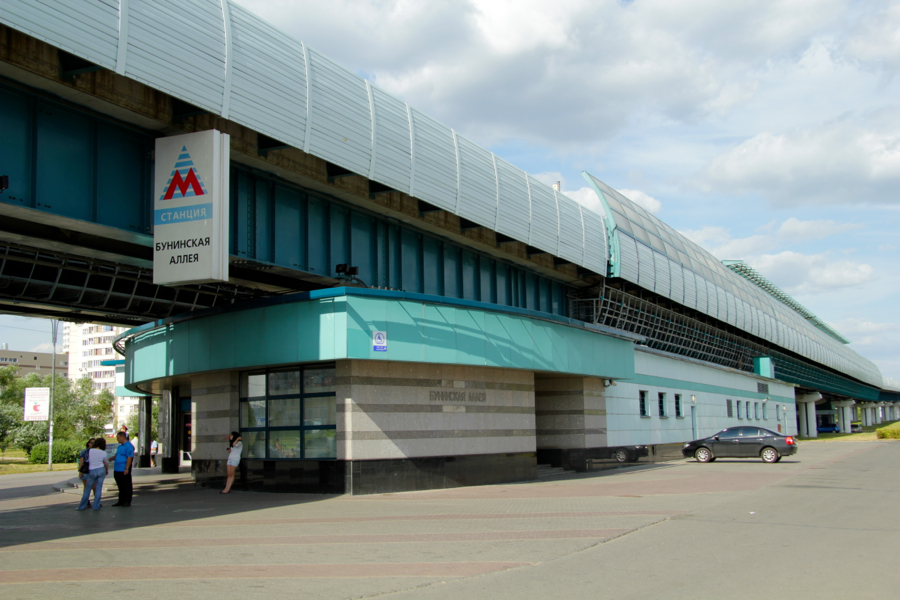 Moscow Metro (Московский метрополитен) Butovskaya Line of Light Metro (Бутовская линия лёгкого метро)